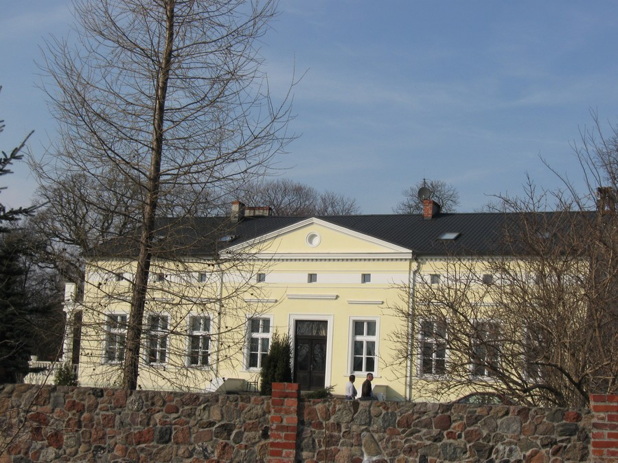 Pałac w Łącku